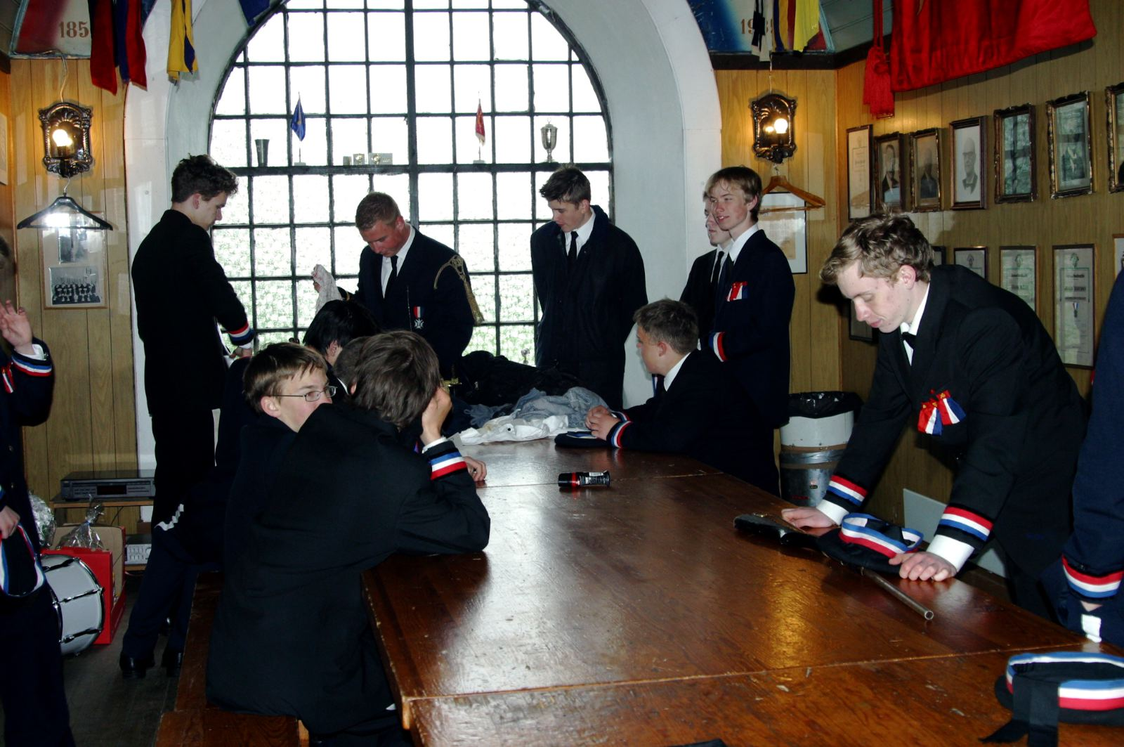 Fredrikberg fort, Bergen, Nordnæsgutter